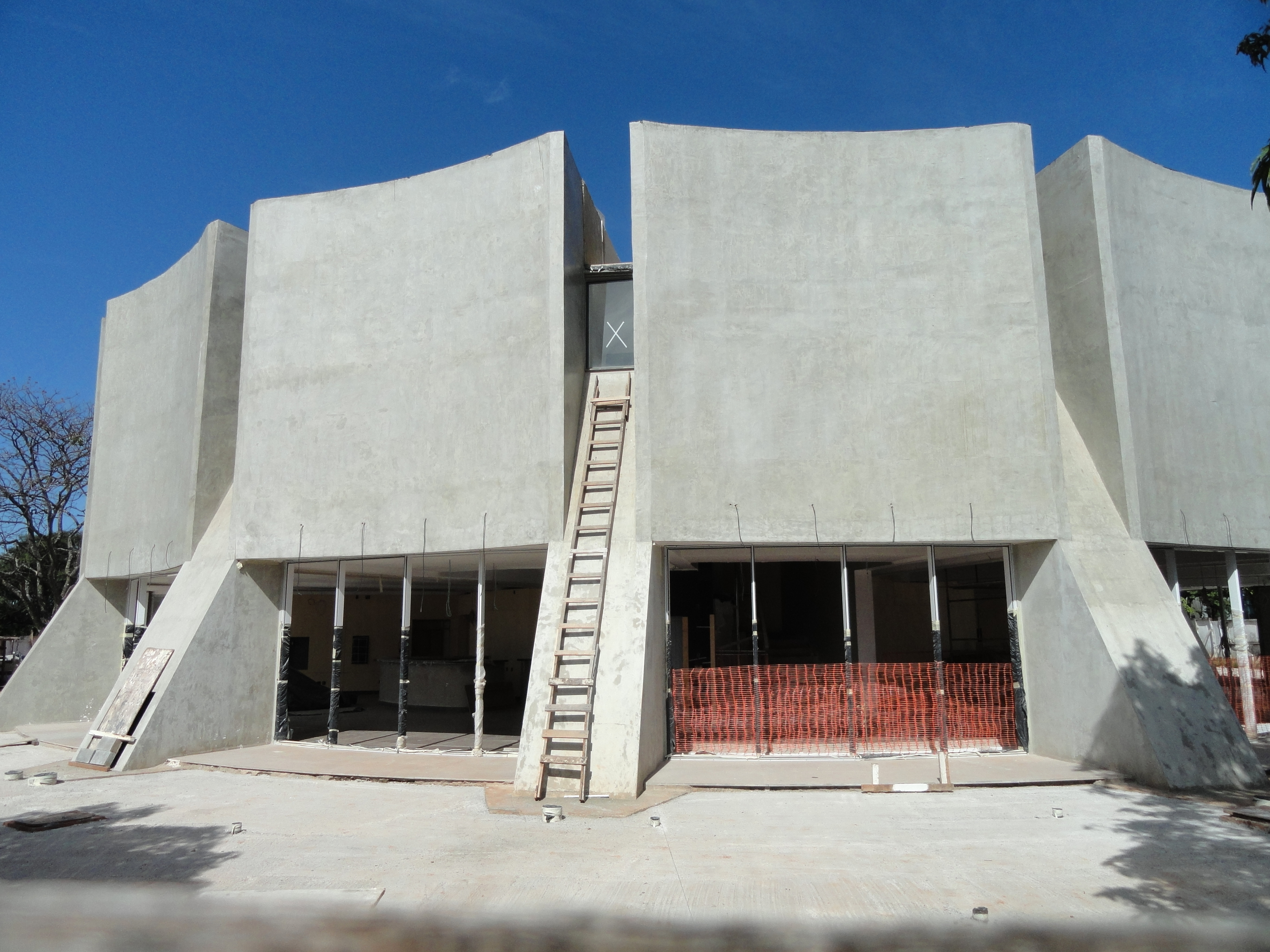 Planetário de Brasília, Brasília, Brazil.